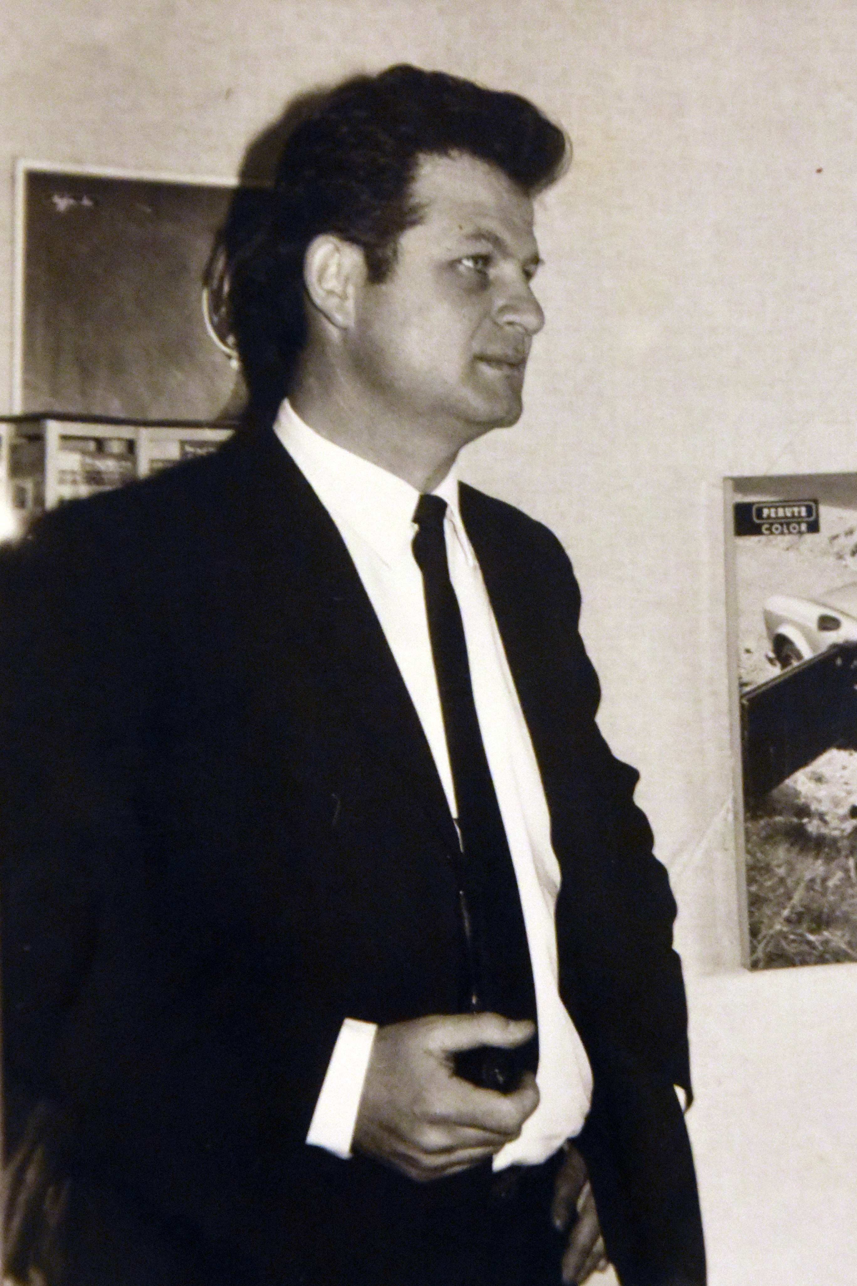 עורך דין משה קפלנסקי בתחילת הקריירה המשפטית